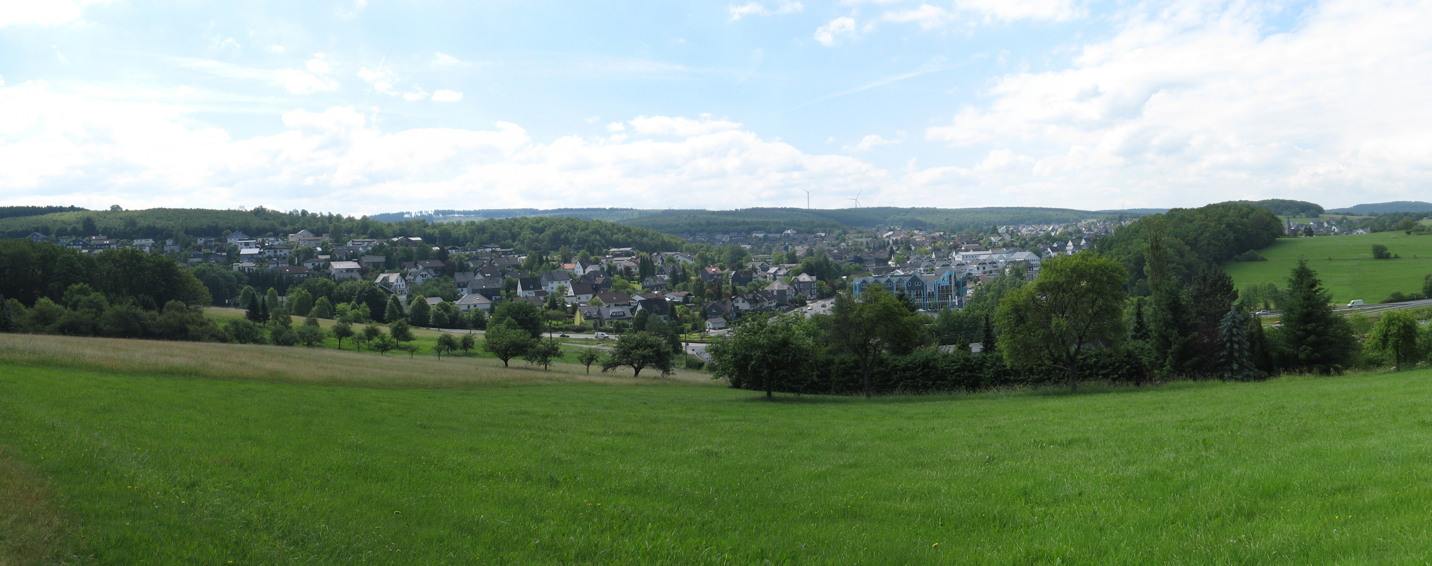 Panorama von Wilnsdorf von Norden.